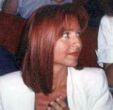 Lilli Gruber